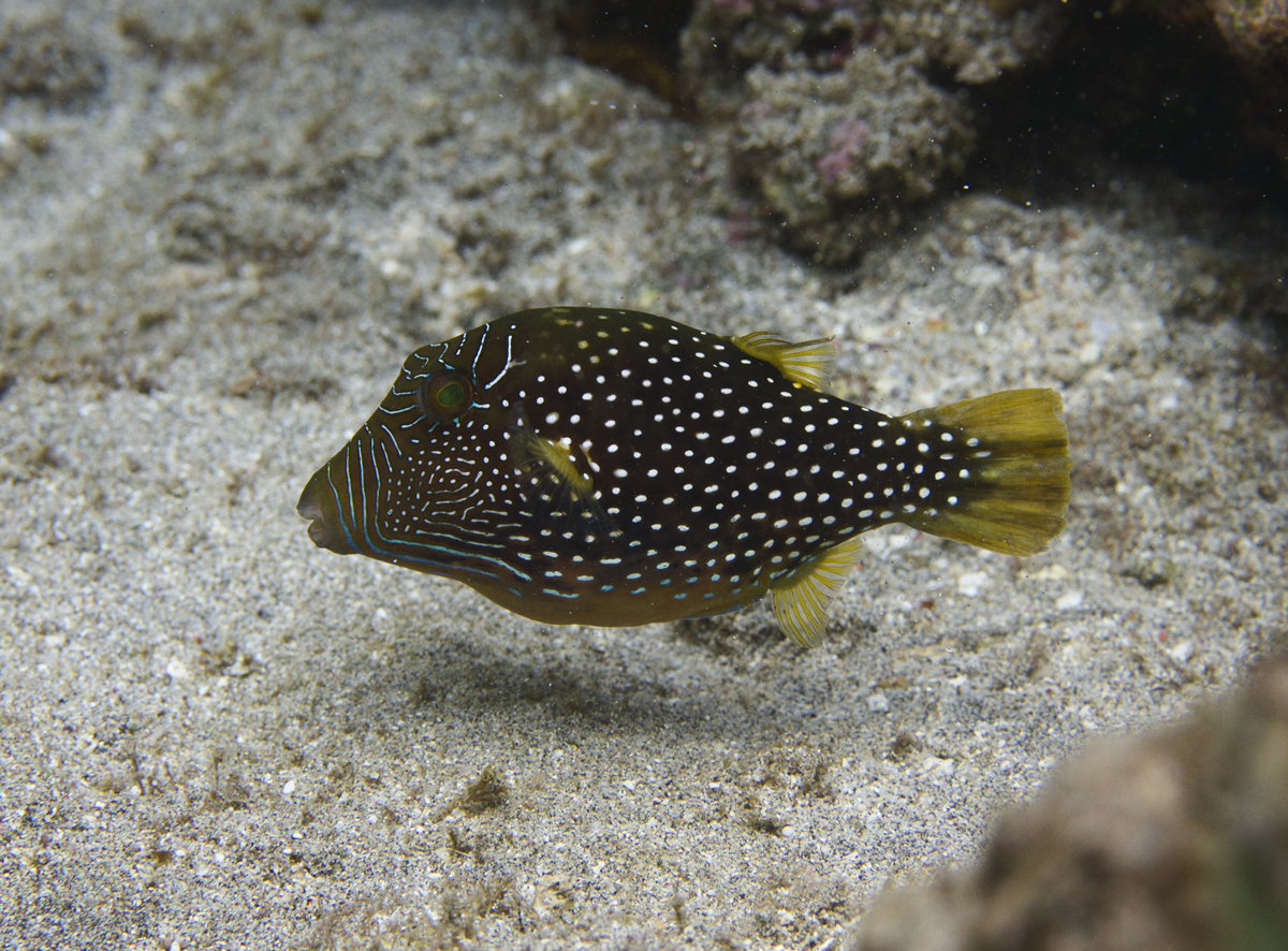 Un canthigaster du Natal (Canthigaster natalensis) à la Réunion.